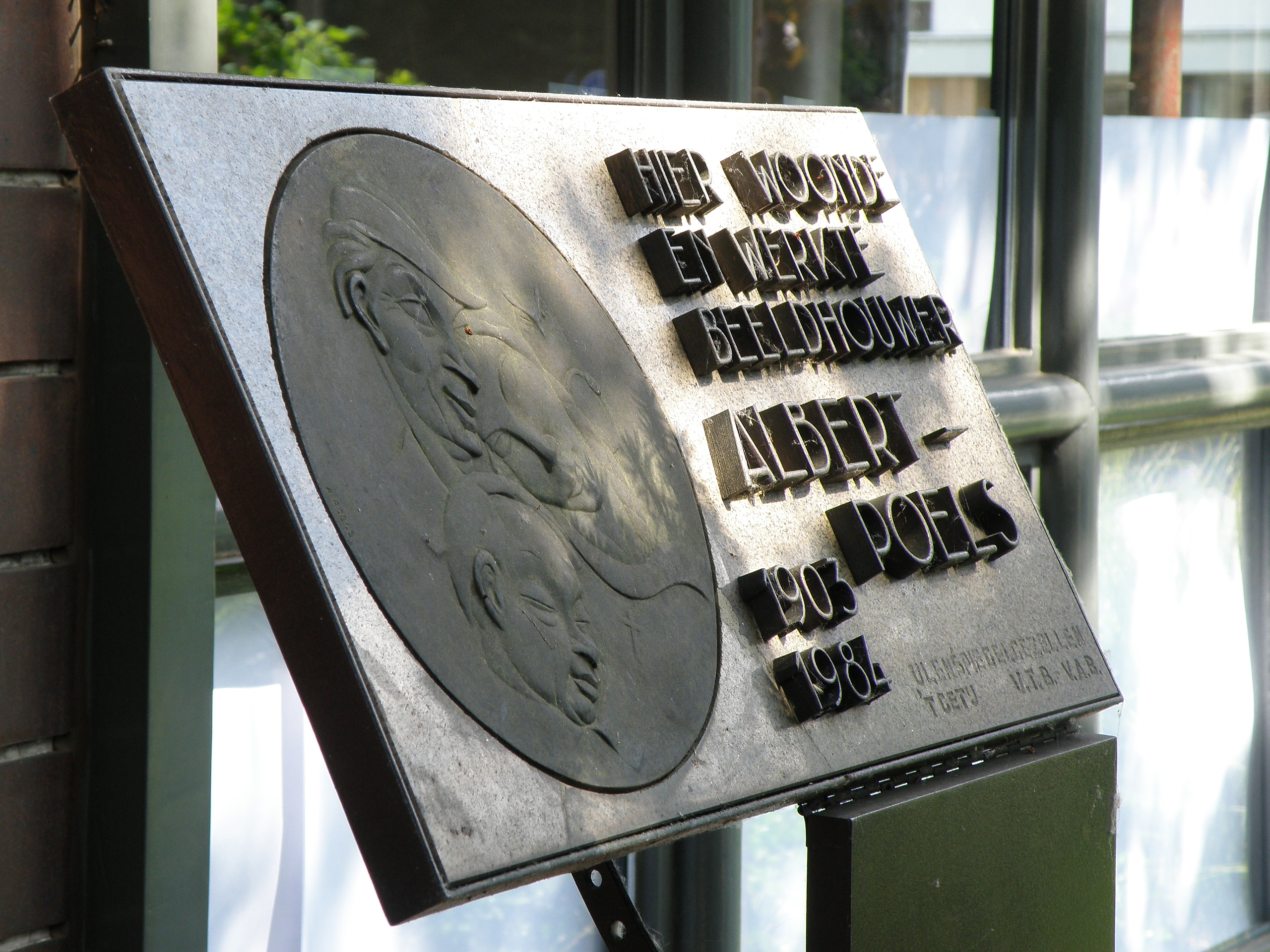 Antwerpen, district Borgerhout. Huis aan de Arthur Matthyslaan nr. 61 (hoek met Thibautstraat) te Borgerhout. Huis speciaal gebouwd voor (en mede ontworpen door?) Antwerps kunstenaar Albert Poels, in Nieuwe Zakelijkheid (anno 1938-1940), met achterliggend beeldhouwersatelier. Gedenkplaat in de voortuin ter ere van Albert Poels. Vgl. Inventaris van het Onroerend Erfgoed.